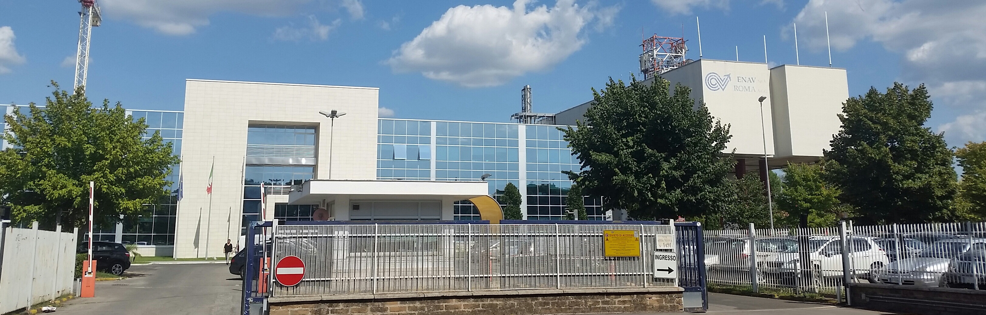 ENAV, sede dell'ACC di Roma-Ciampino